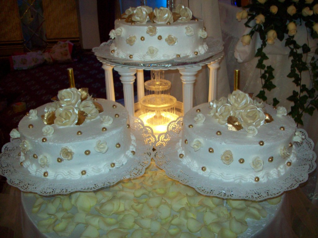 Праздничный свадебный торт